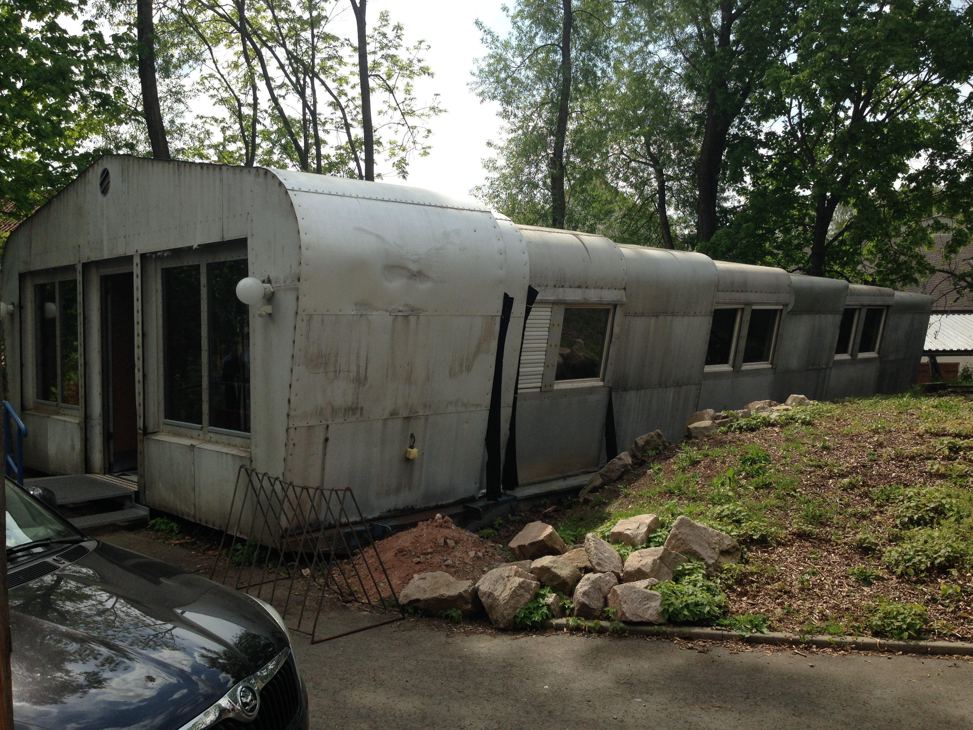 Raumerweiterungshalle im Deutschen Landwirtschaftsmuseum Schloss Blankenhain, Stadt Crimmitschau, Landkreis Zwickau, Sachsen